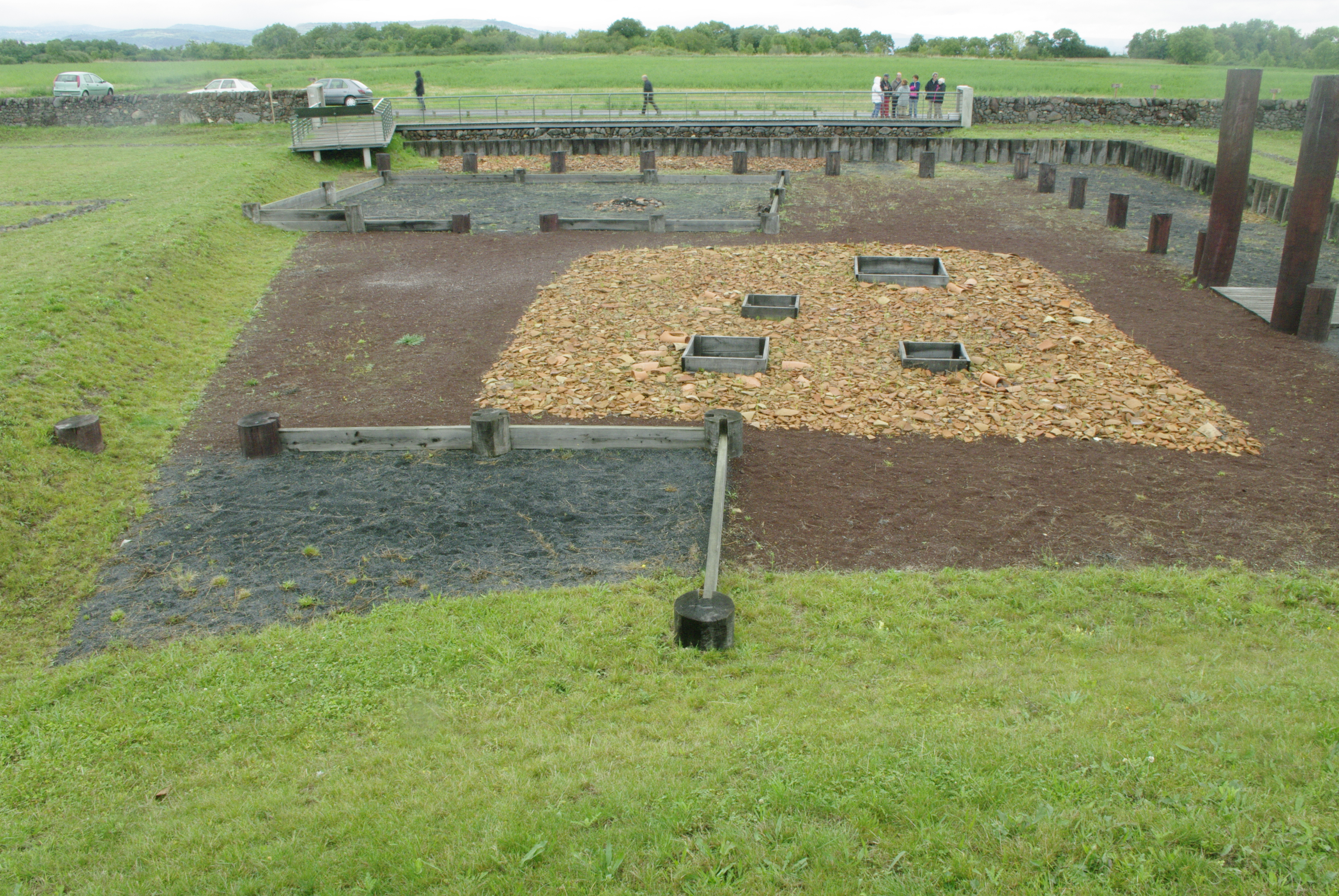 Sanctuaire de Corent ; le bâtiment B se trouve au premier plan (bas-gauche). Photographie prise lors des journées du patrimoine 2013.